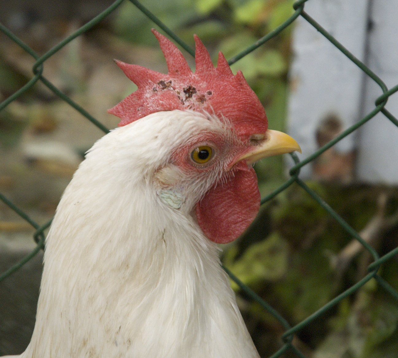 hlava slepice leghornky